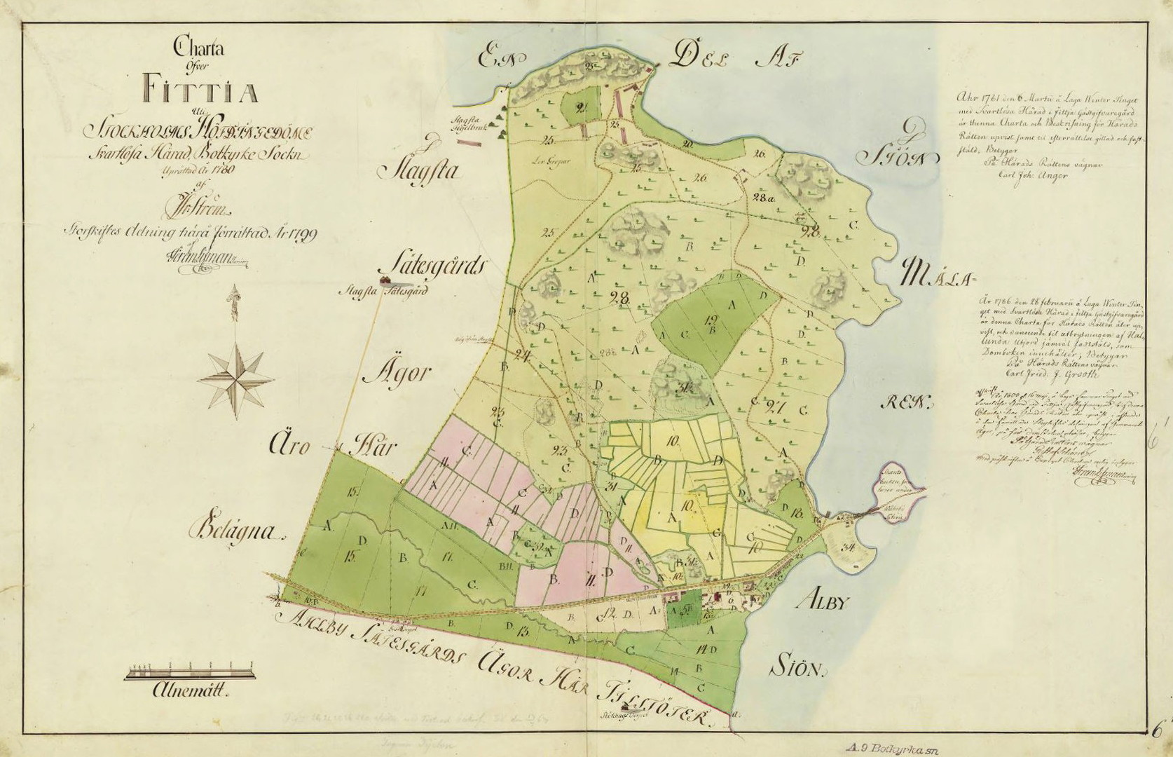 Fittja gårds ägor, Botkyrka socken, storskifte